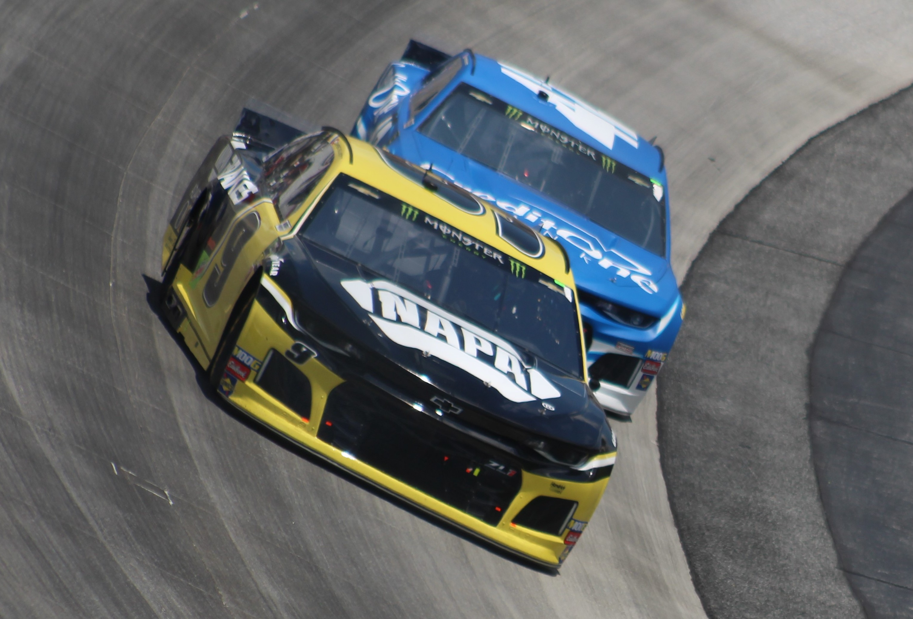 2019 Gander RV 400